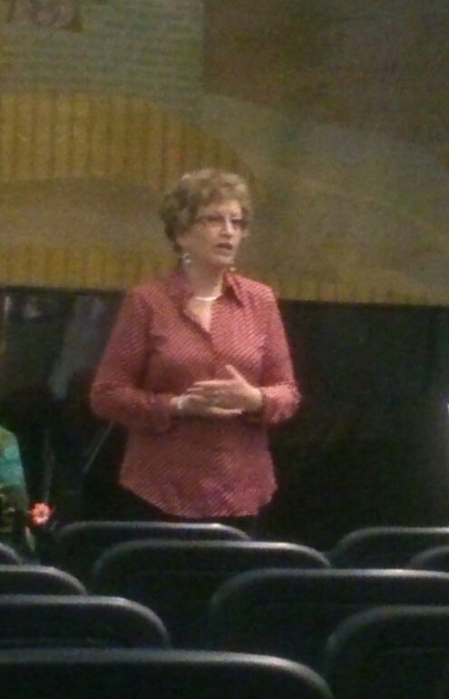 MTÜ Kirjandusfestival Prima Vista juhatuse esimees Ilona Smuškina Prima Vista pressikonverentsil.